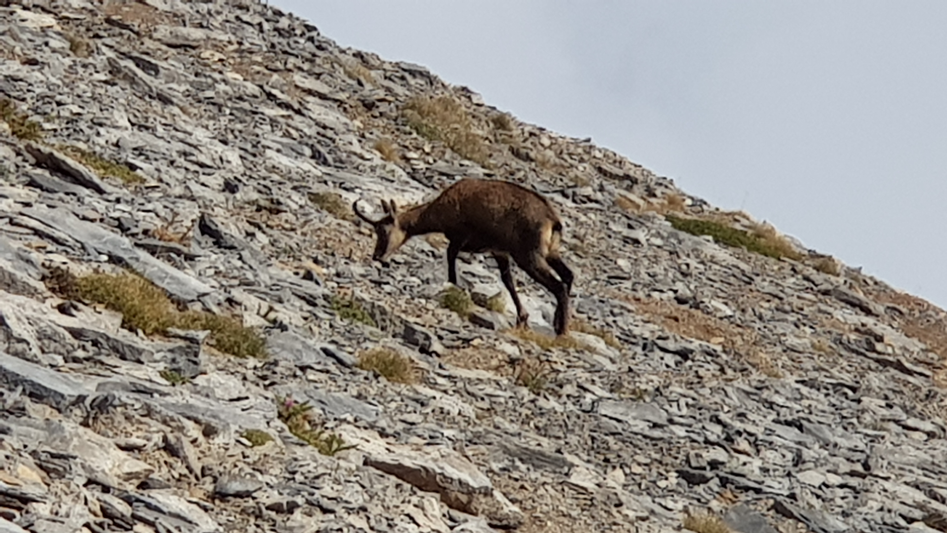 Femmina di camoscio dei balcani al pascolo a 2700 metri di quota sulla Cima Skala del Monte Olimpo in Grecia